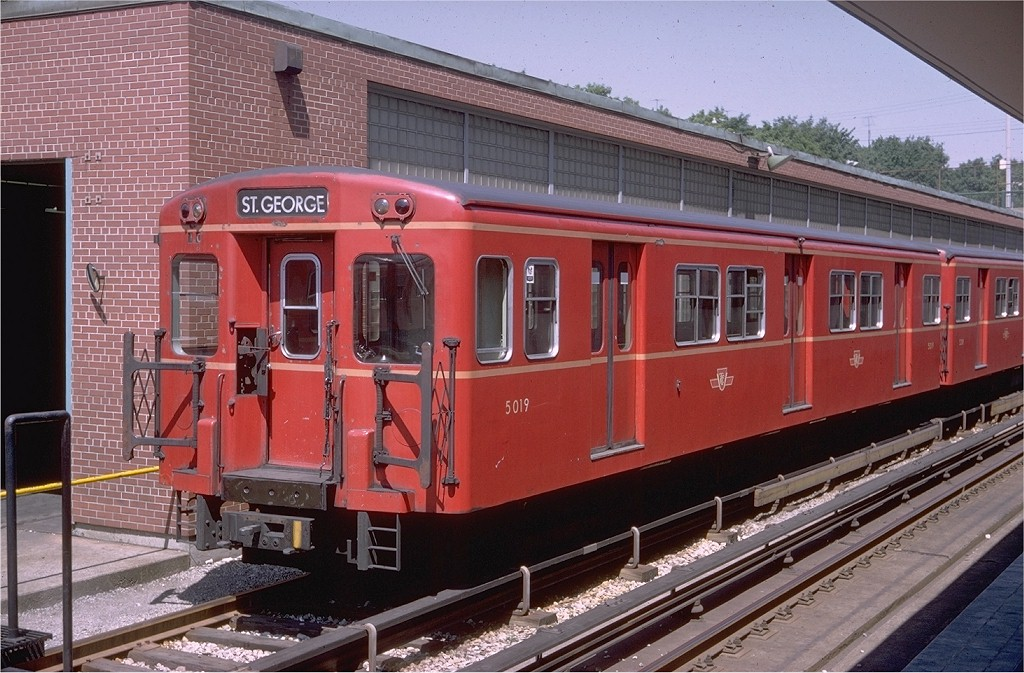 Toronto Subway car at Davisville circa 1969